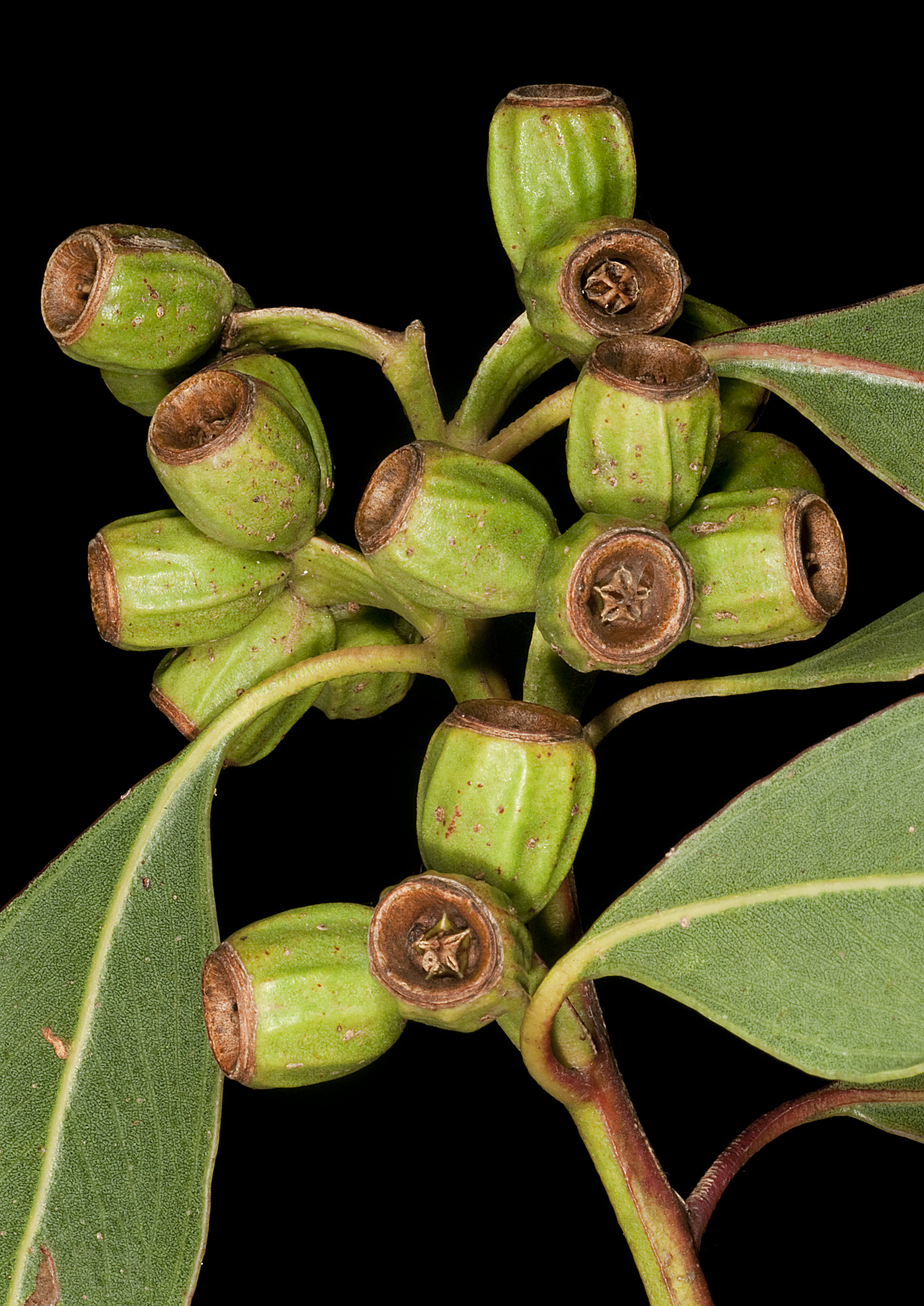 KRT4048